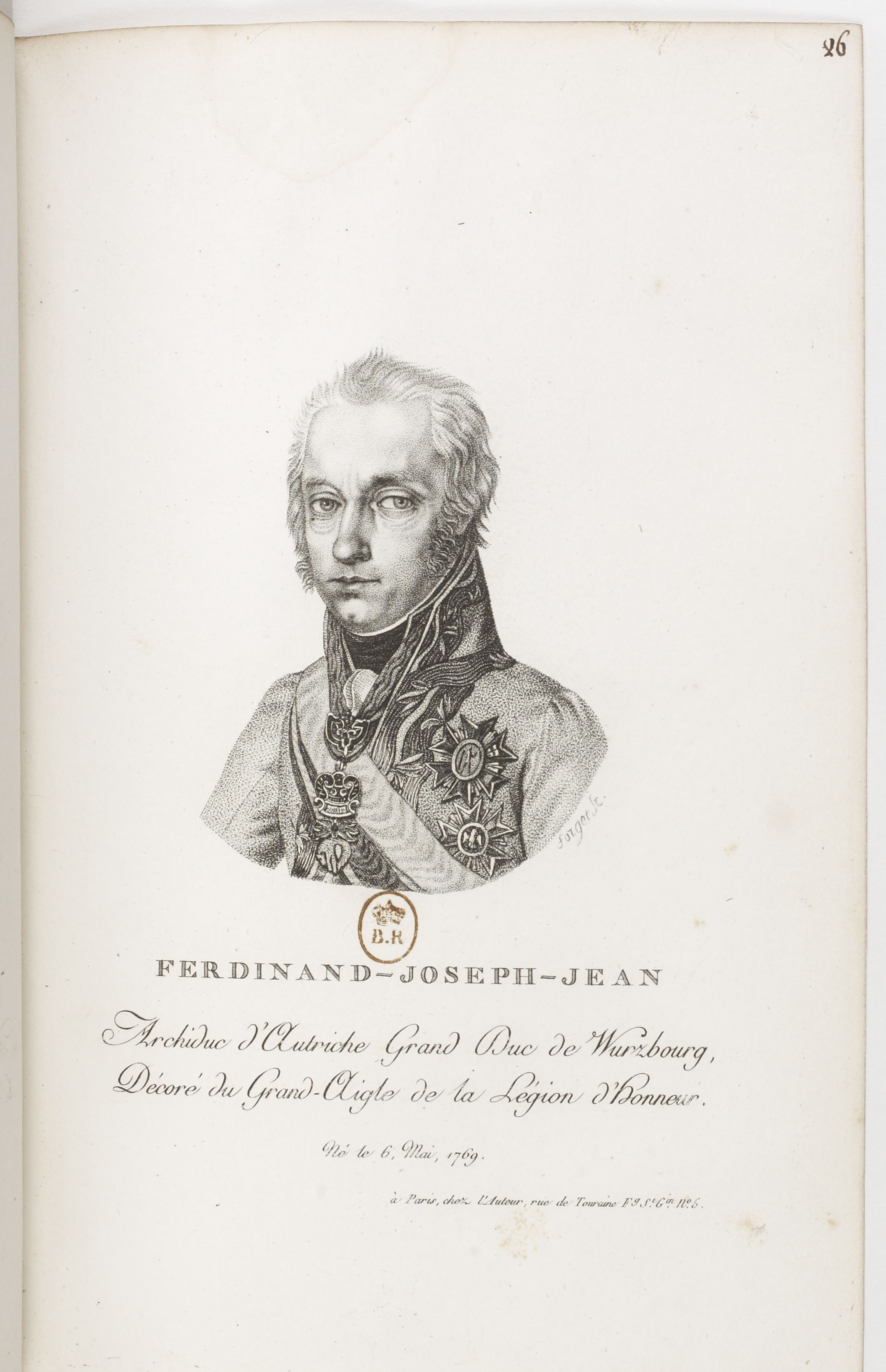 Collection complète des portraits des Grands-Aigles et des Grands-Officiers de la Légion d Honneur... / publiée par... Meyer, peintre... : vue 40 - [Ferdinand III], archiduc d Autriche